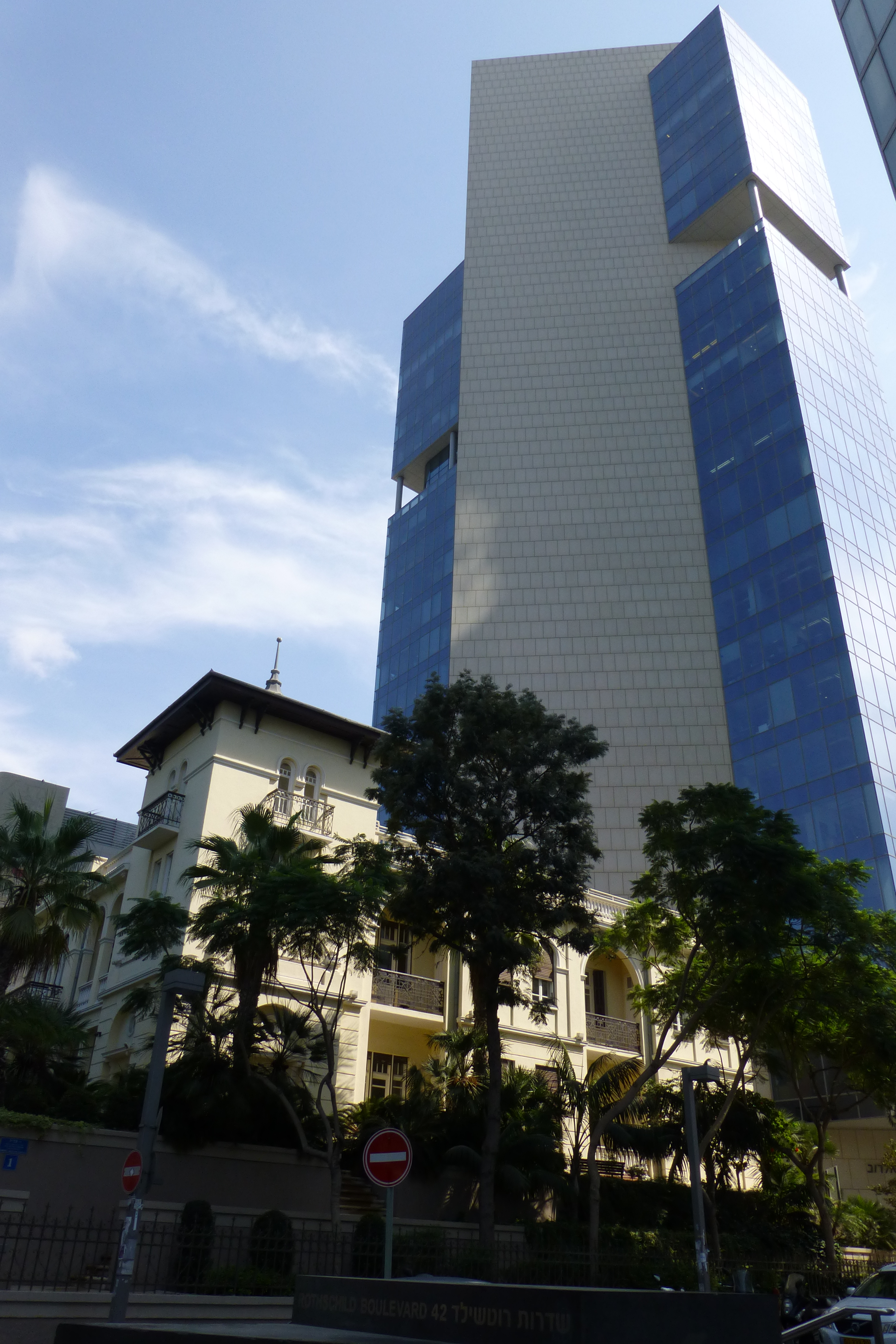 בית השגרירות הרוסית הוא מבנה היסטורי הממוקם בשדרות רוטשילד מספר 46, פינת רחוב שד"ל בתל אביב, והוא אחד מבנייניה הנודעים של העיר. הבניין מתאפיין באדריכלות של הסגנון האקלקטי הייחודי ללב תל אביב. הבית תוכנן ב־1924 על ידי האדריכל יהודה מגידוביץ', עבור משפחת לוין האמידה. הוא משופע בקישוטים וסמלים ברוח הסגנון הרומנטי, ובחזיתו פגודה. עם השנים החליף הבניין בעלים, ואחרי הקמת המדינה שכנה בו צירות ברית המועצות. ב־9 בפברואר 1953, בשעות הערב, בוצע בו הפיגוע בצירות הסובייטית שבעקבותיה ניתקה ברית המועצות את יחסיה הדיפלומטיים עם מדינת ישראל. היחסים חודשו רק לאחר מות סטלין ביולי 1953.